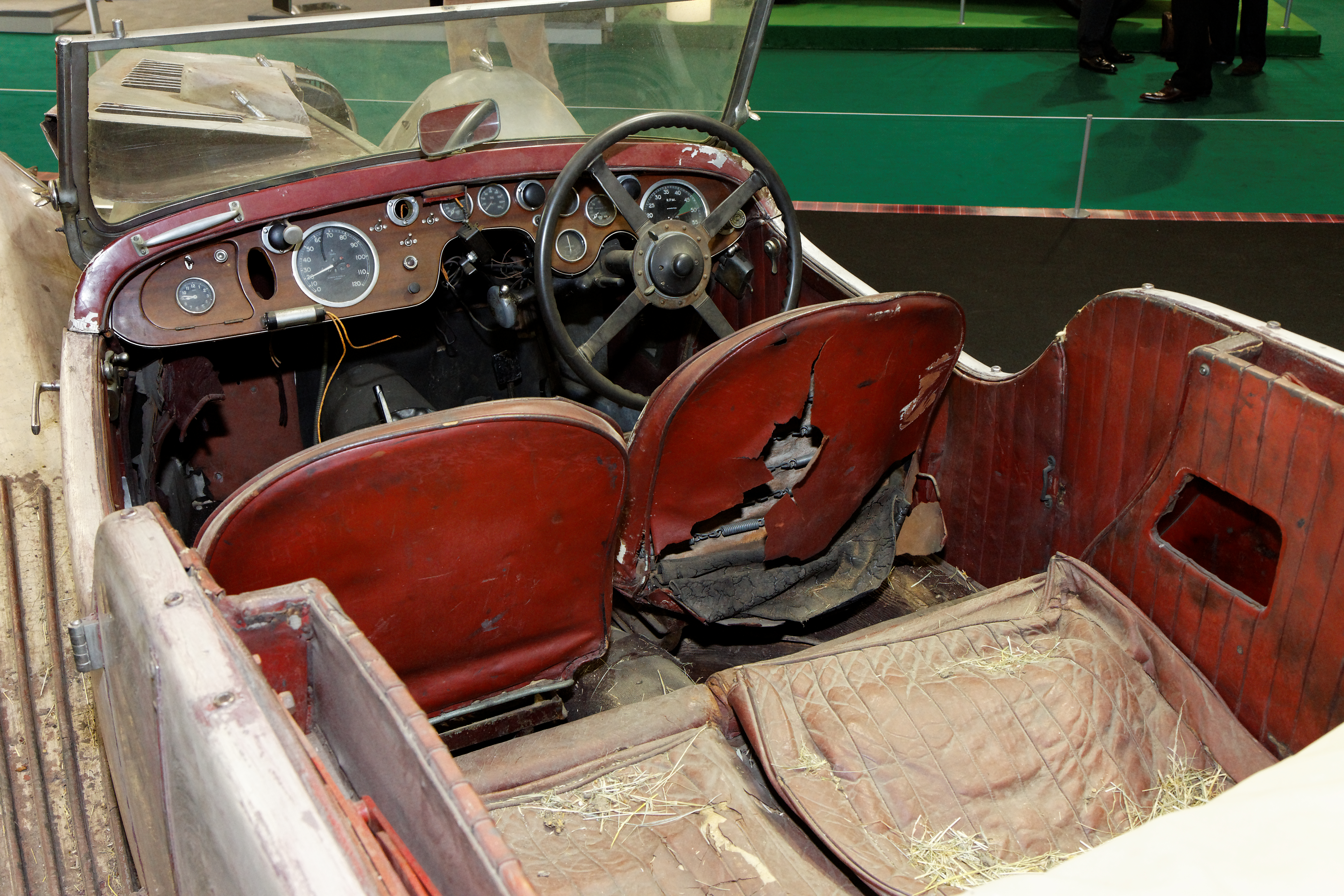 Photographie prise lors du salon rétromobile 2011 à Paris, porte de Versailles.